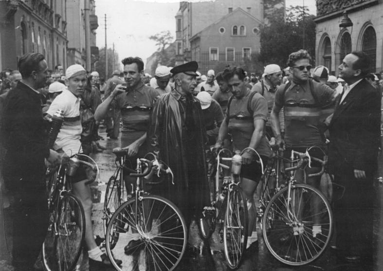 Riesa, Straßenrennen, Radsportler, DDR Zentralbild Siegert 1.6.1953 Erster Lauf der DDR-Meisterschaft im Straßenfahren Am 31.5.1953 wurde von Riesa aus der erste Lauf der Meisterschaften der Deutschen Demokratischen Republik im Straßenfahren ausgetragen. Im Anschluß an das Rennen besichtigten die Meister des Sportes Lothar Meister, Bernhard Trefflich, Gustav-Adolf Schur und Paul Dinter auf Einladung des Werkleiters, Held der Arbeit, Max Friedemann das Stahl- und Walzwerk Riesa. UBz: Vor dem Start unterhalten sich Nationalpreisträger Max Hornauer, Brigadier der Blockstraße und Arbeitsdirektor Wende mit den Teilnehmern der Straßenfahrt. vlnr: Trainer Nickel, Lothar Meister, Bernhard Trefflich, Max Hornauer, Paul Dinter, Gustav-Adolf Schur, Arbeitsdirektor Wende.